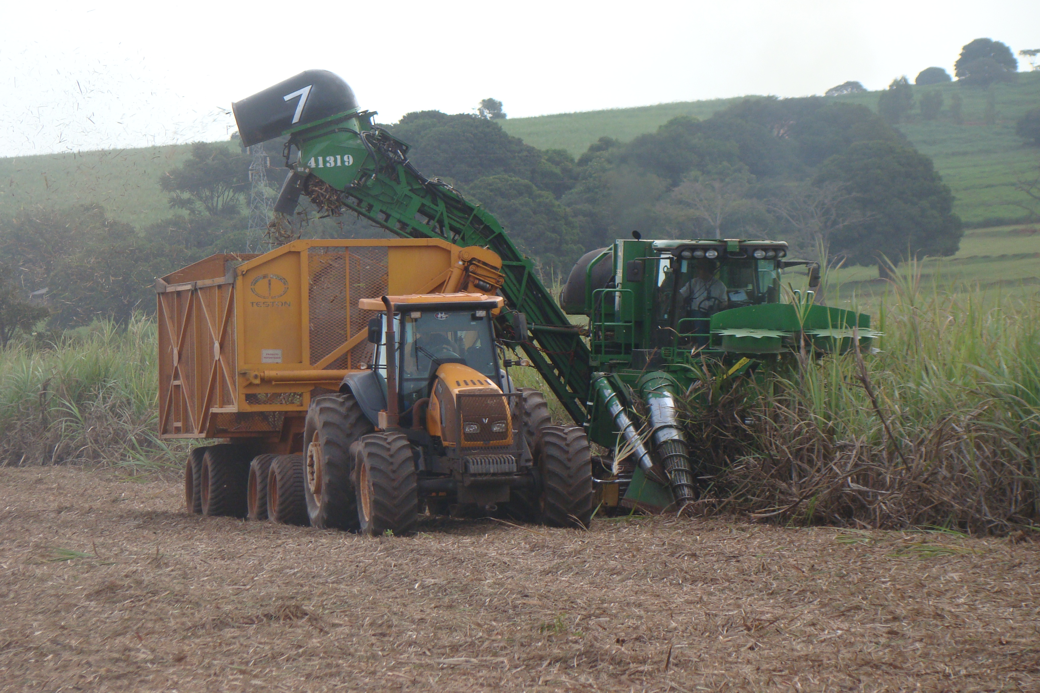 Cana-de-açúcar - Colheita Mecanizada - Santo Inácio PR.